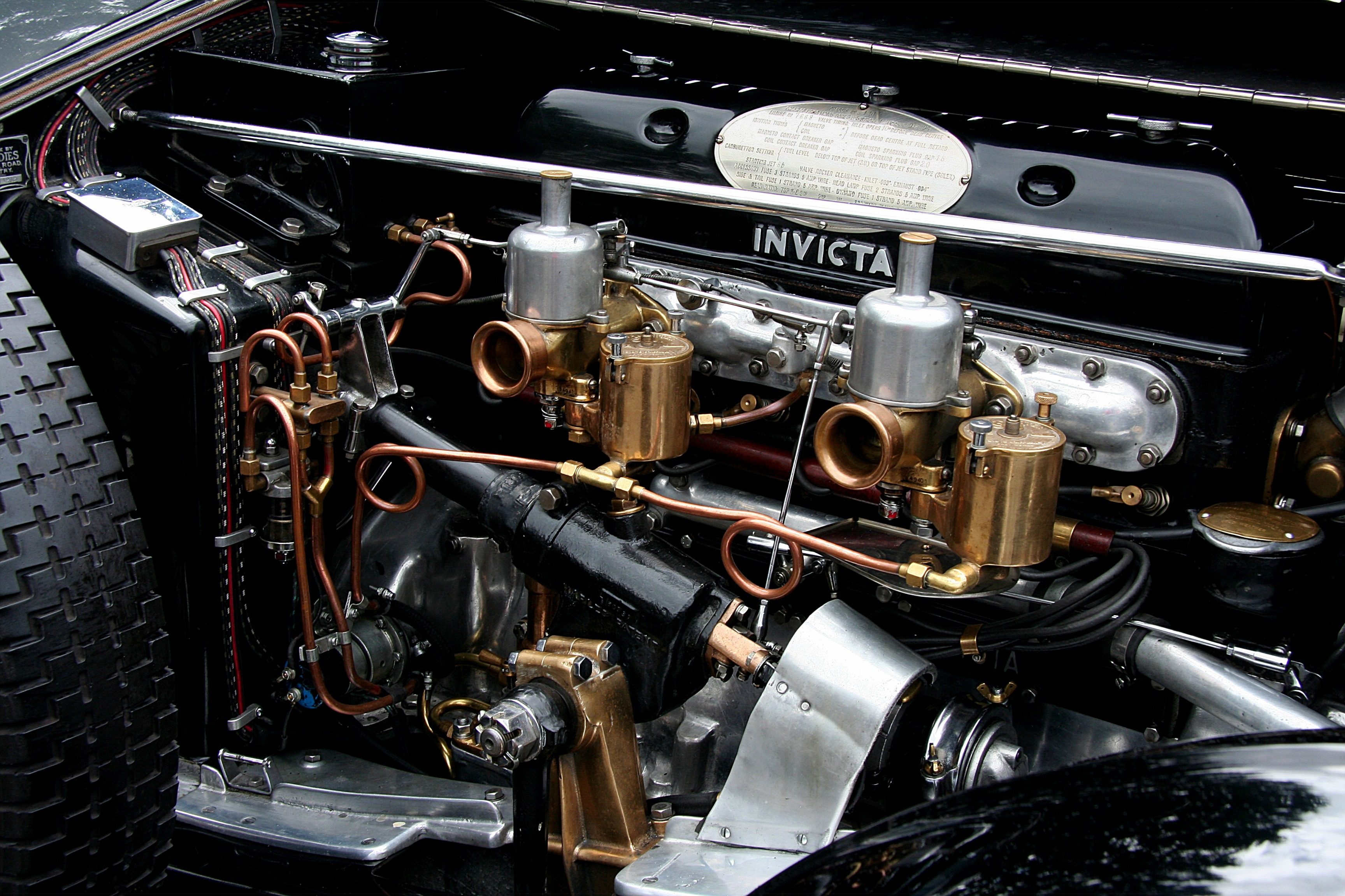 Invicta S-Type Rennversion, Baujahr 1931